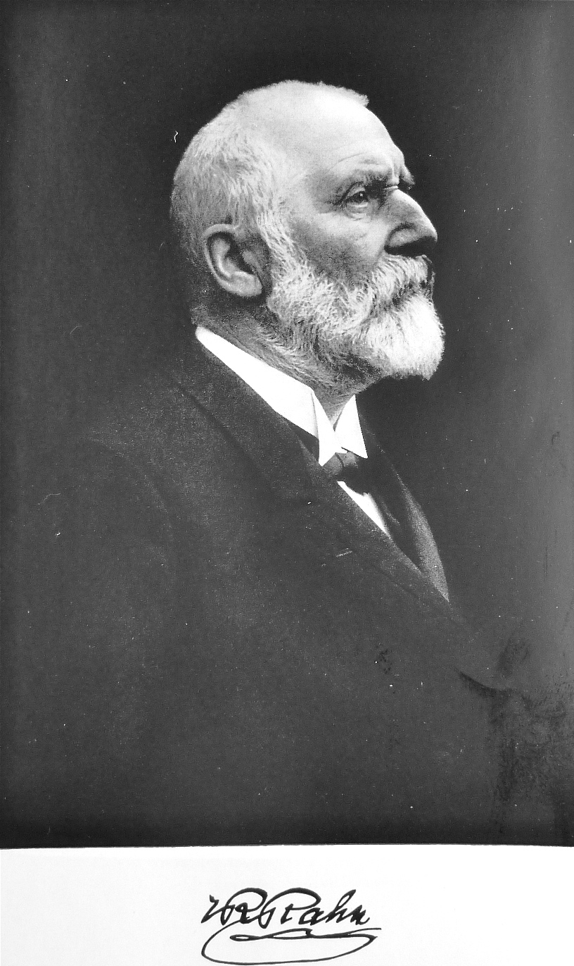 Johann Rudolf Rahn Rahn als 70jähriger